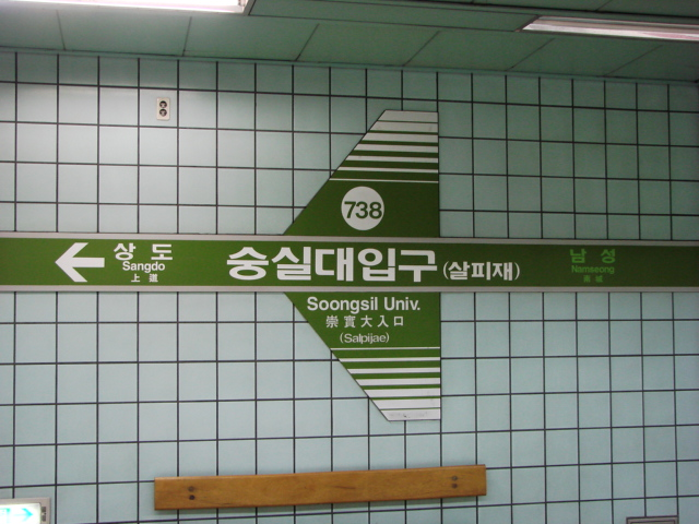 ソウル地下鉄7号線崇実大入口駅 駅名標